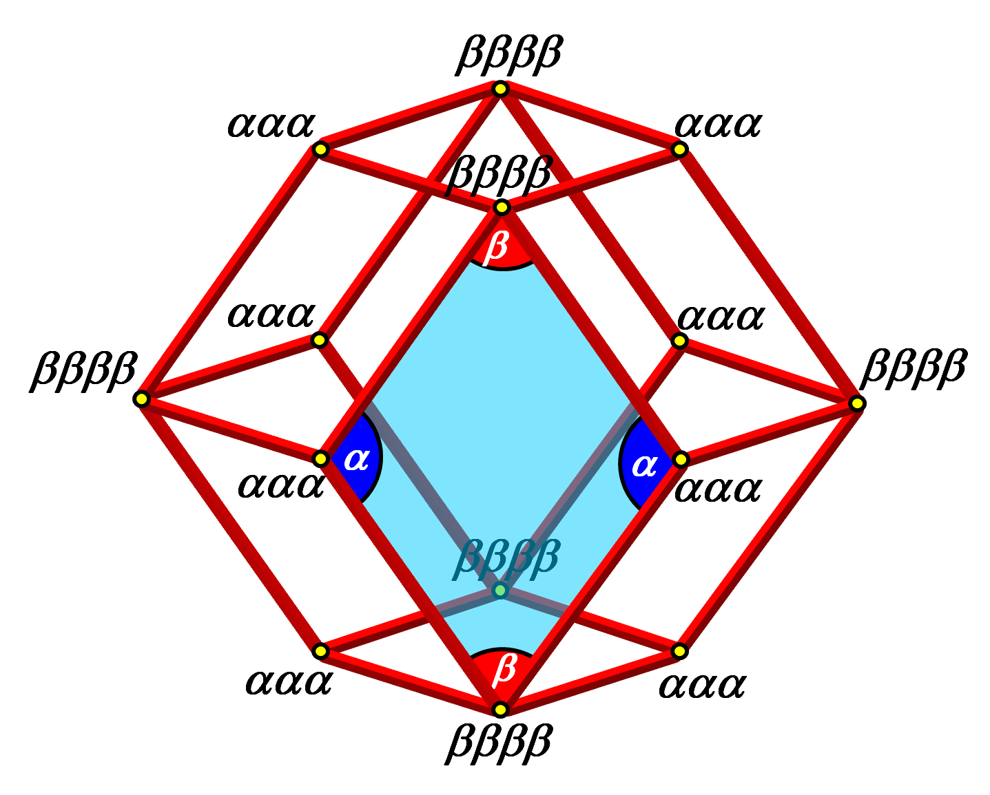 Sono indicate le diverse combinazioni degli angoli dei rombi di Maraldi che confluiscono in ciascuno dei 14 vertici del Dodecaedro rombico.